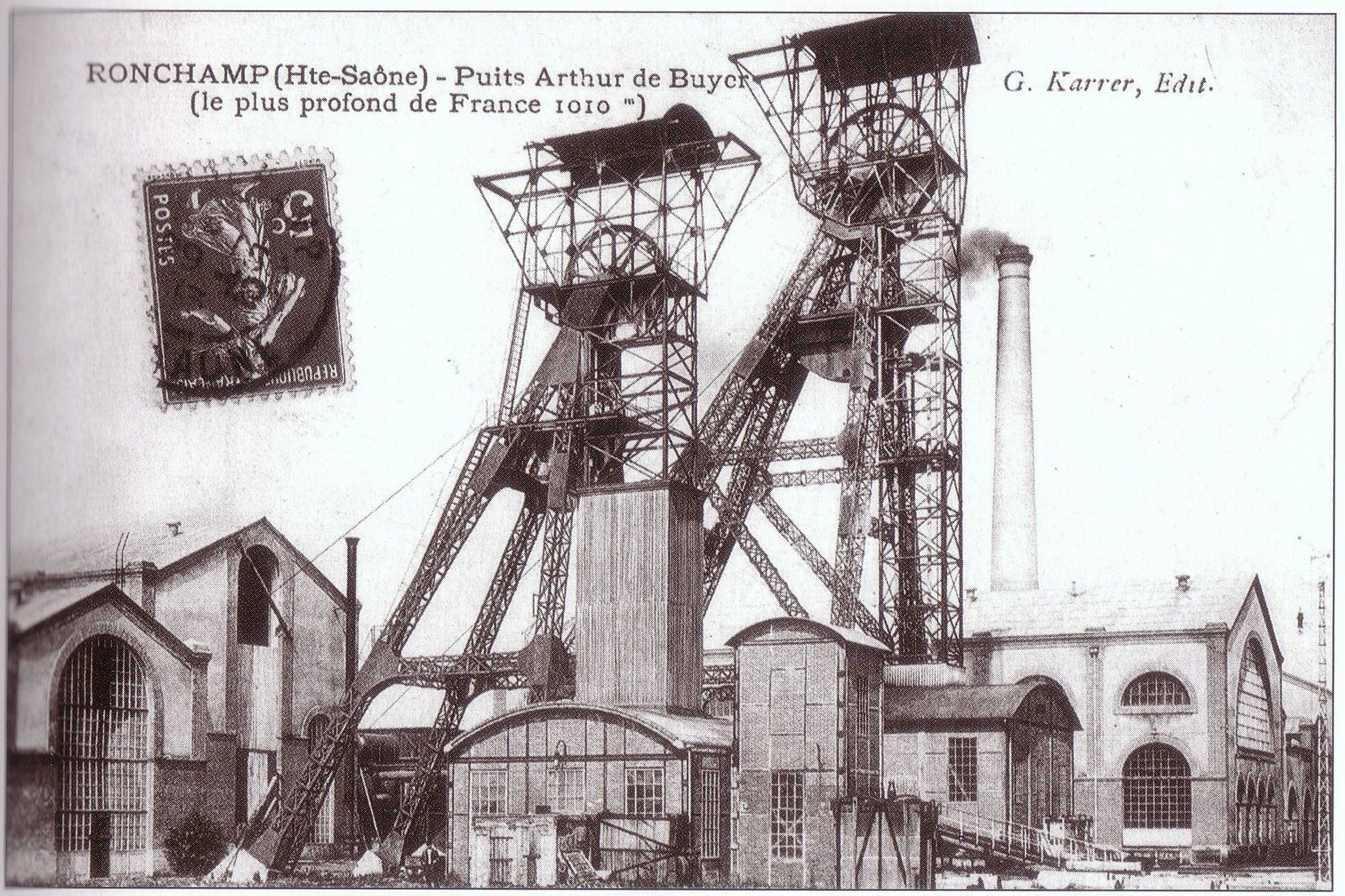 Le gisement de Ronchamp-Champagney a été exploité depuis la seconde moitié du XIXe siècle dans 27 puits. Ces installations industrielles sont les puits Arthur de Buyer, à une époque le plus profond de France (-1010m). Numérisation d'un carte postale des années 1910-1920.